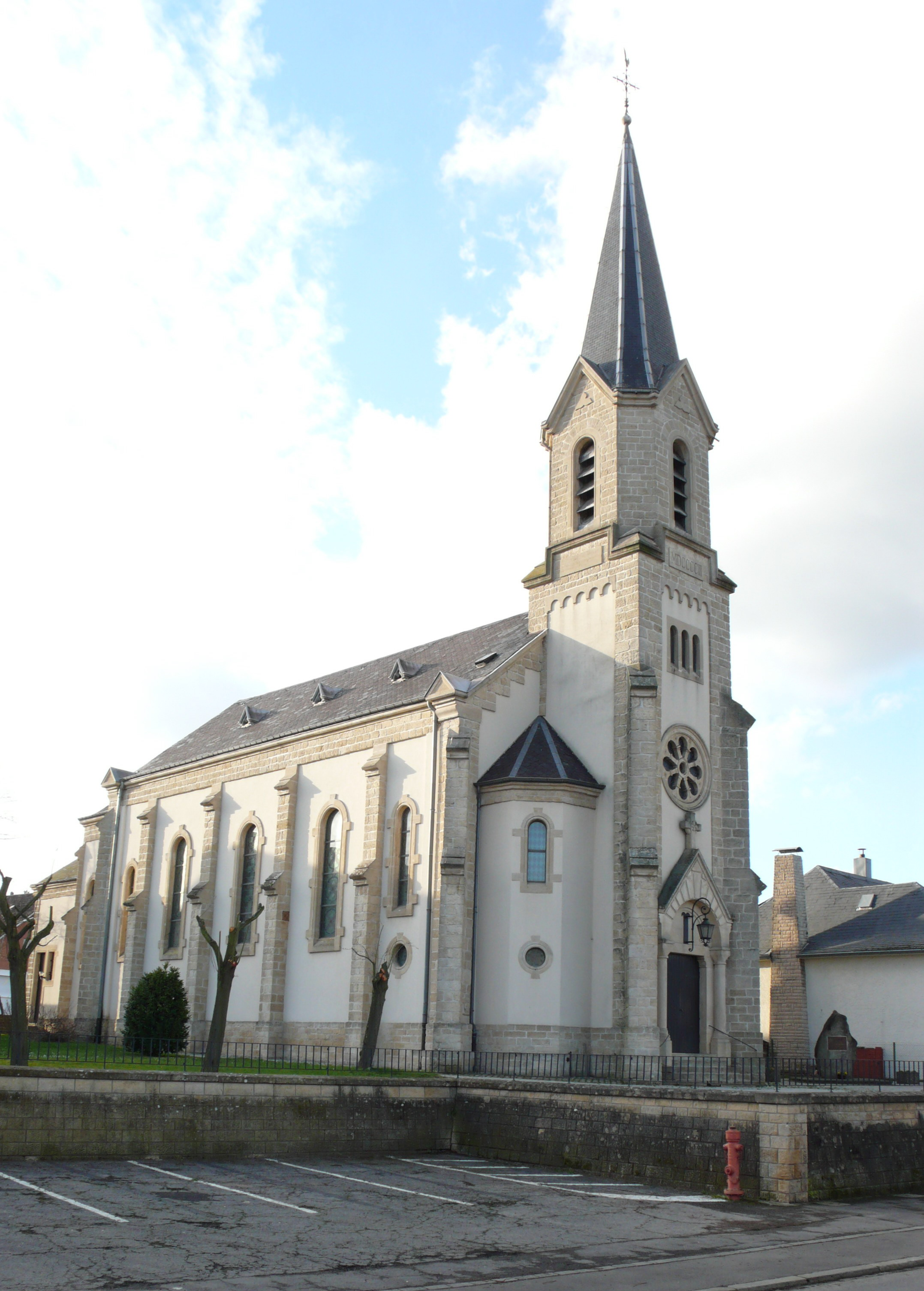 Kierch Hunchereng